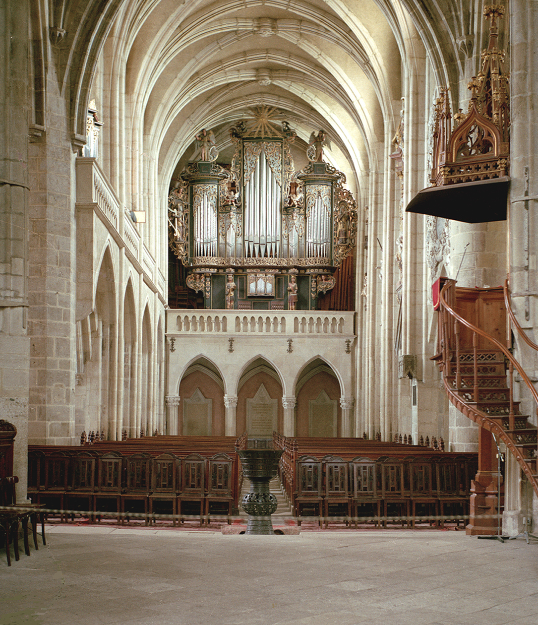 Orgel der Stadtpfarrkirche zu Hermannstadt (Sibiu) in Siebenbürgen, Rumänien. Der Orgelprospekt von 1672 ist ein Werk des Johann West. Die Orgel ist eine Arbeit der Firma Sauer aus Frankfurt a.d.Oder. Sie wurde 1914/15 aufgestellt. Die Orgelempore erhielt ihre heutige Form im Zuge der Restaurierung 1906-1912. (nach Angaben aus Baudenkmäler in Siebenbürgen, Heft 18, vom ABF Architekturbüro Fabini-Hermannstadt herausgegeben)